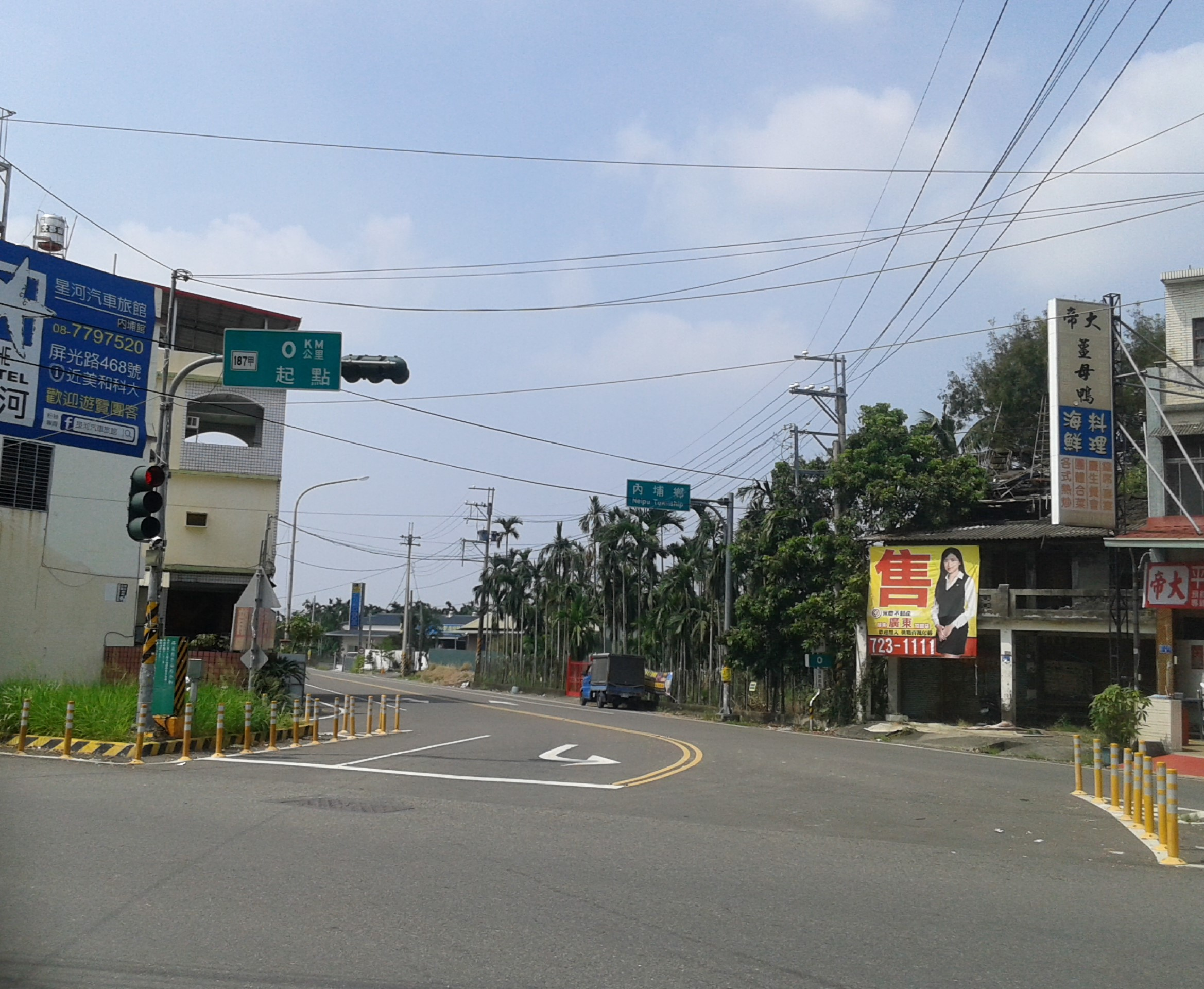 縣道187甲線起點